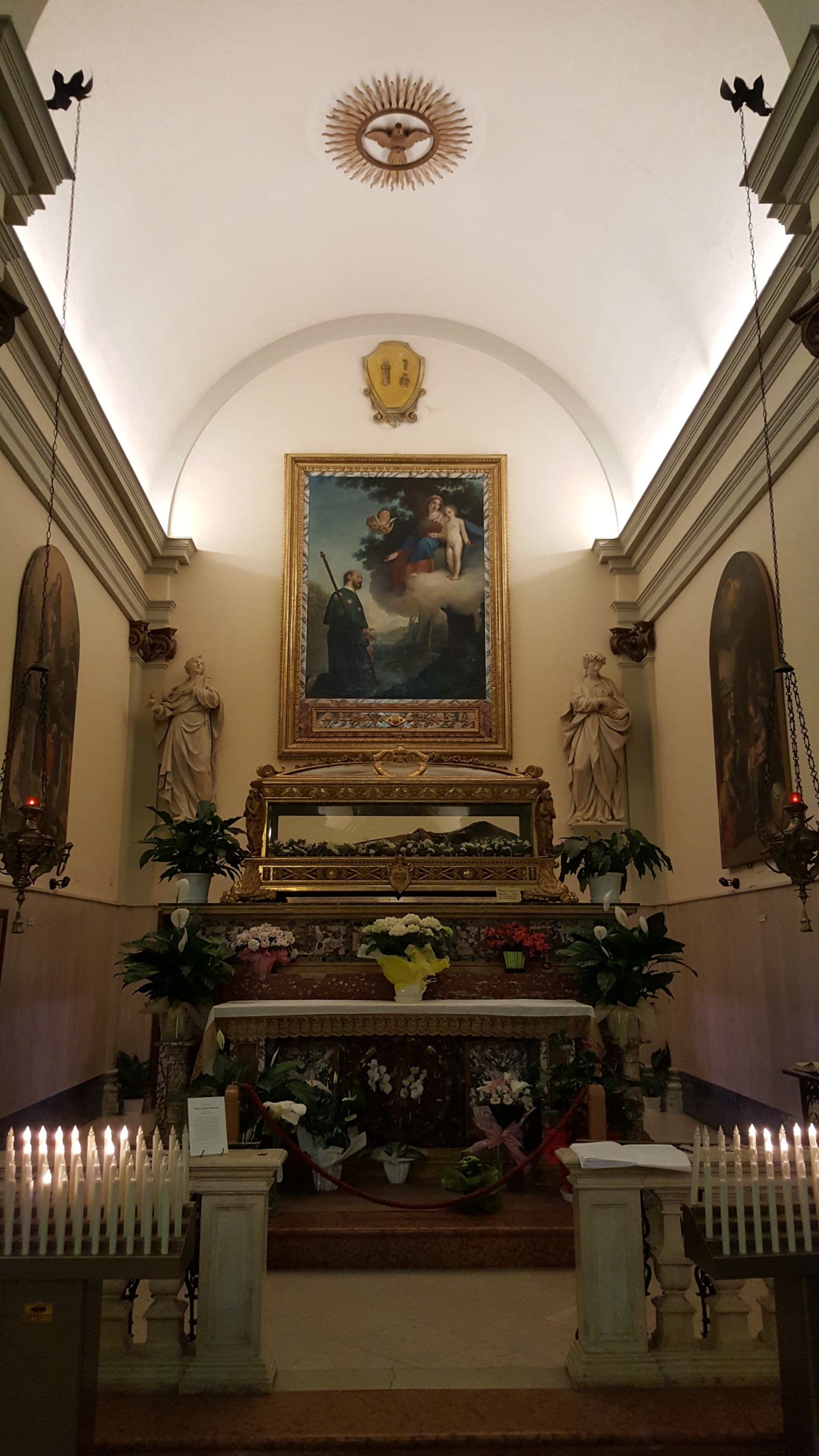 Museo di Saludecio e del Beato Amato This is a photo of a monument which is part of cultural heritage of Italy.